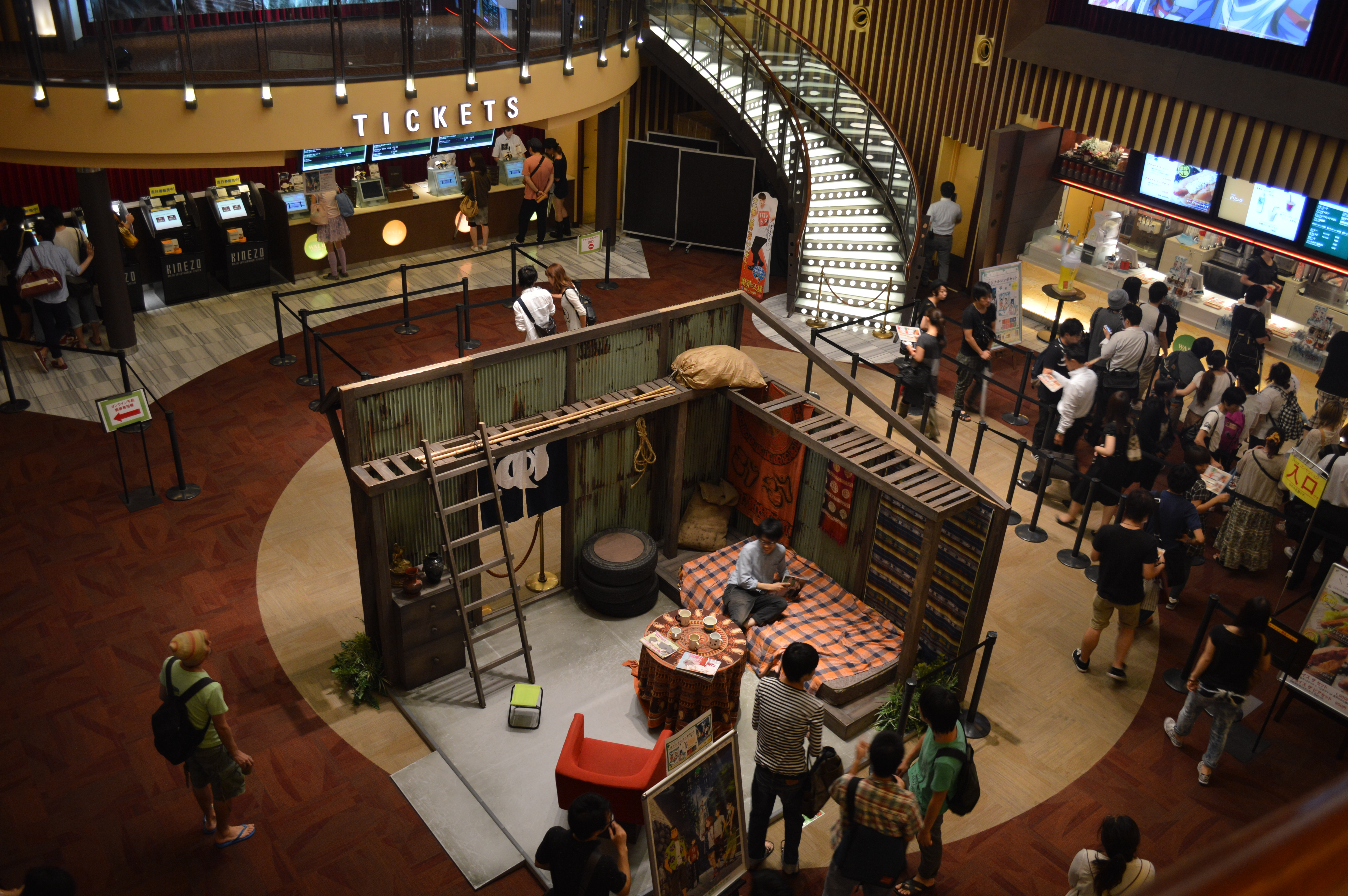 東京都新宿区、新宿バルト9